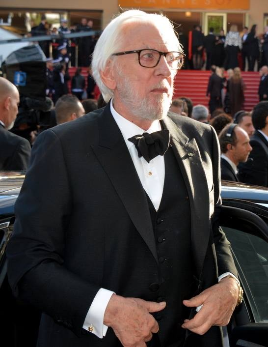 Donald Sutherland au festival de Cannes